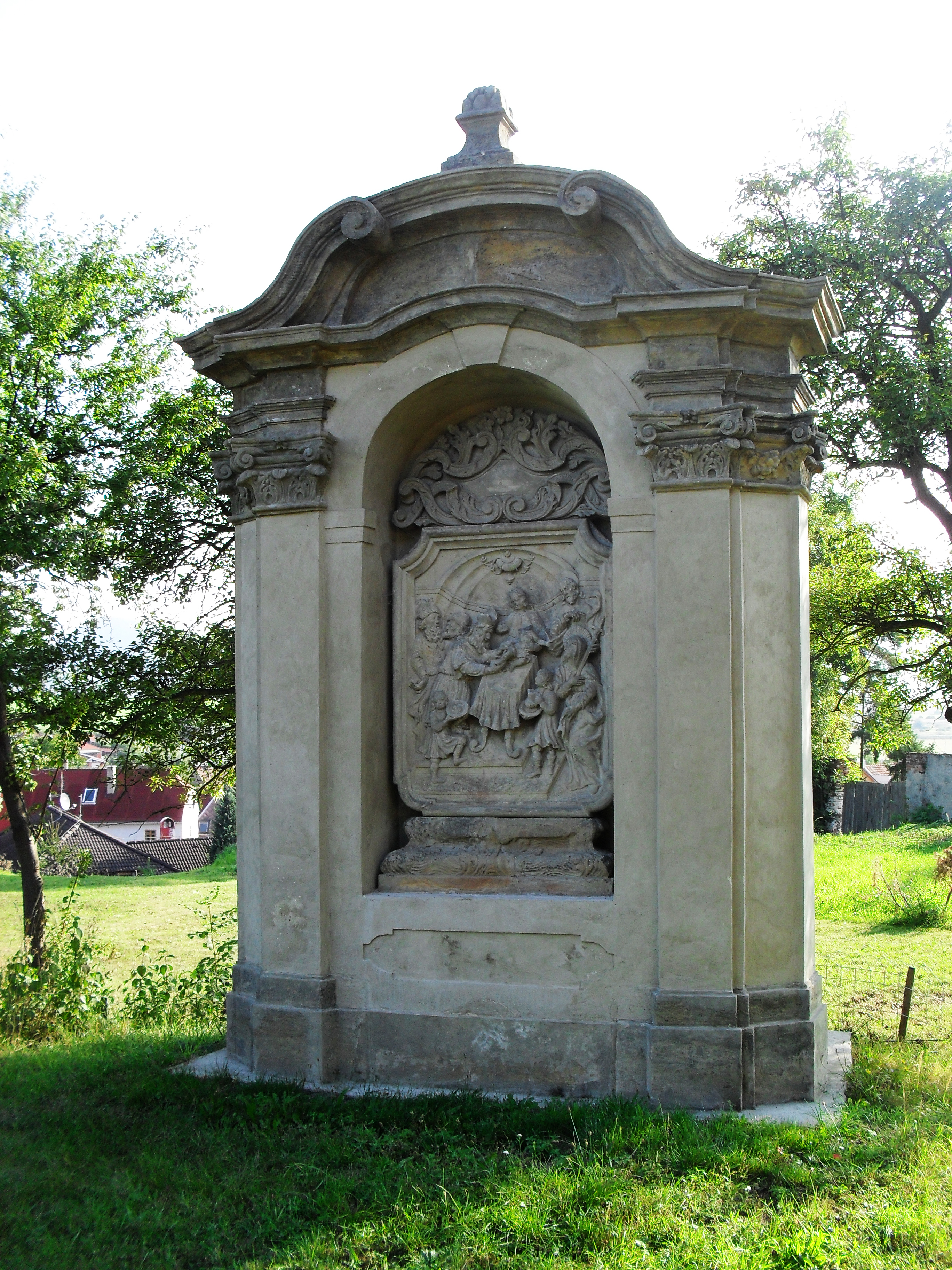 Výklenková kaplička - soubor výklenkových kaplí I. - IV. (Vtelno), Vtelno